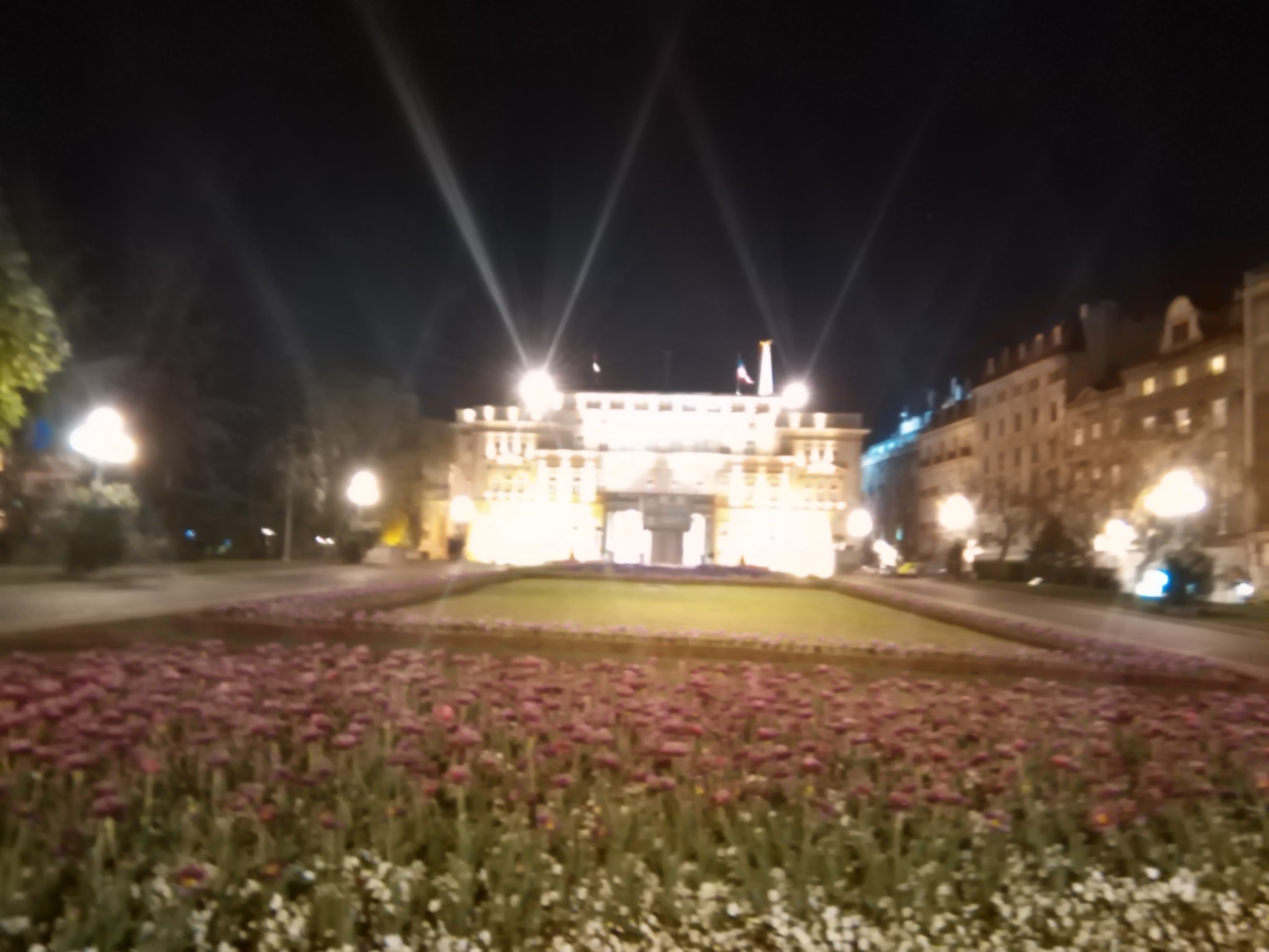 Srpskohrvatski / српскохрватски: Narodni veto, posredni i neposredni oblici odlučivanja naroda i građana pri donošenju zakona i zakonskih akata. Referendum, narodni veto, plebiscit, opoziv mandata. Direktna, posredna, neposredna demokratija. Prenos suverenosti. Narod i građani kao nosioci suverenosti pred prenosa, transfera vlasti. Narod tj građani kao neposredni zakonodavac. Donošenje i primena zakona. Neposredno zakonodavstvo.